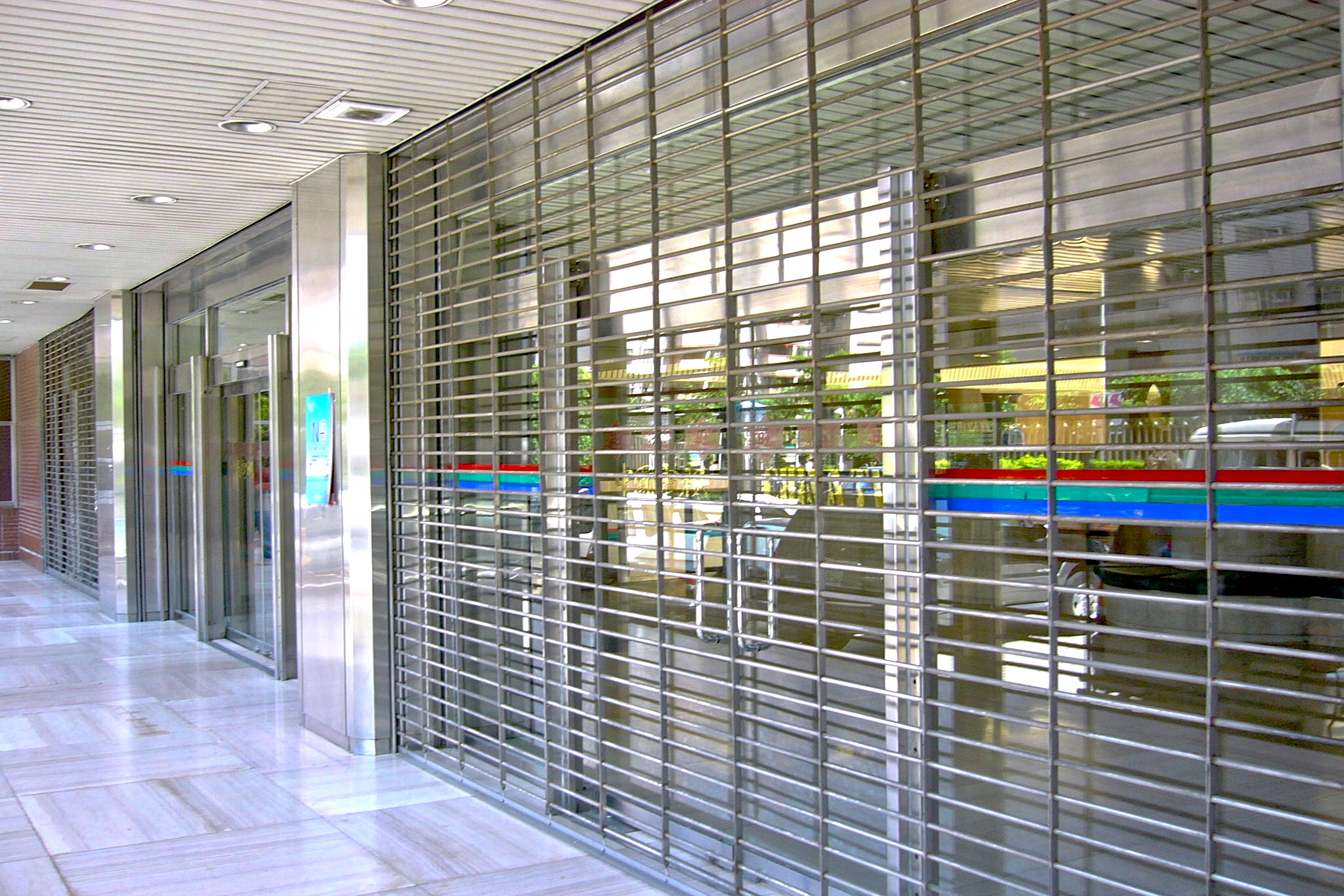 中文（台灣）: 中國電視大廈三道玻璃門：左門與右門是手推門，中門是自動門。三道門中央貼RGB三色線條。